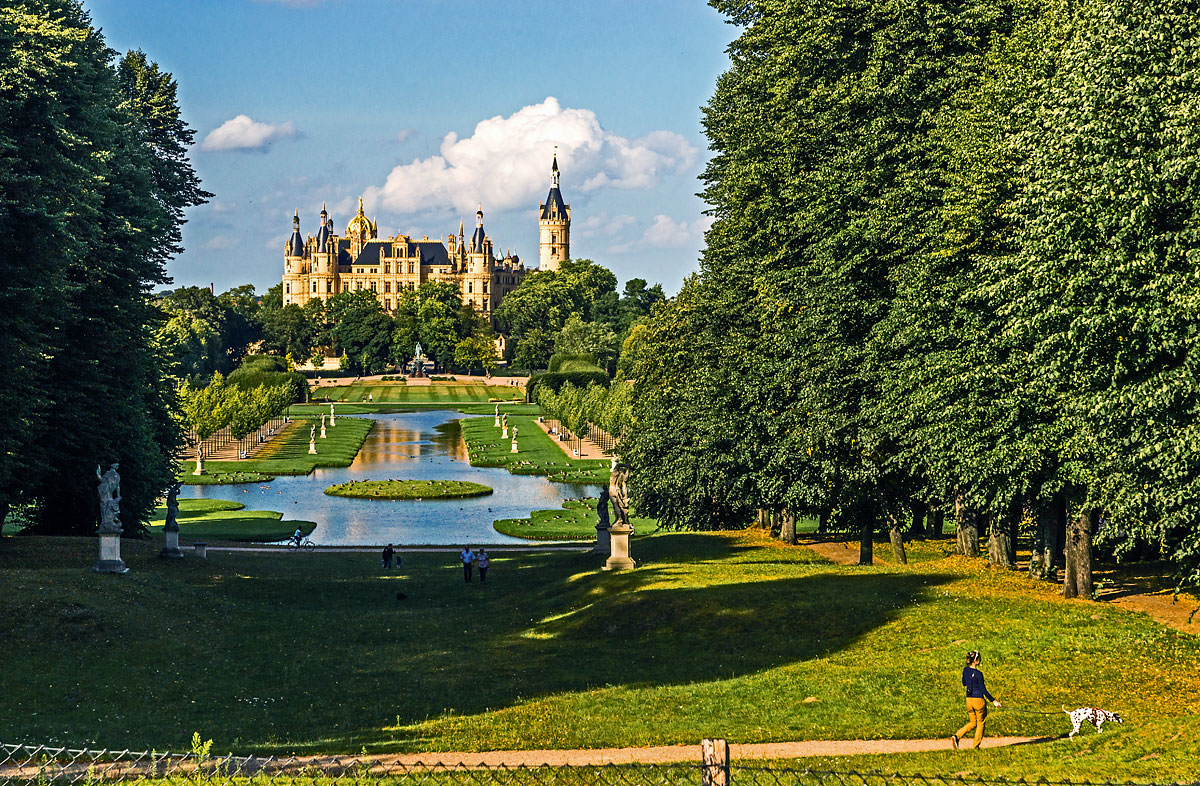 Blick auf das Schloss durch die Gartenanlage mit Kreuzkanal